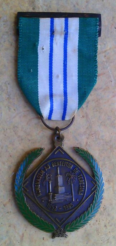 Medalha do Mérito Conselheiro José Antônio Saraiva com o monumento do marco zero de Teresina.